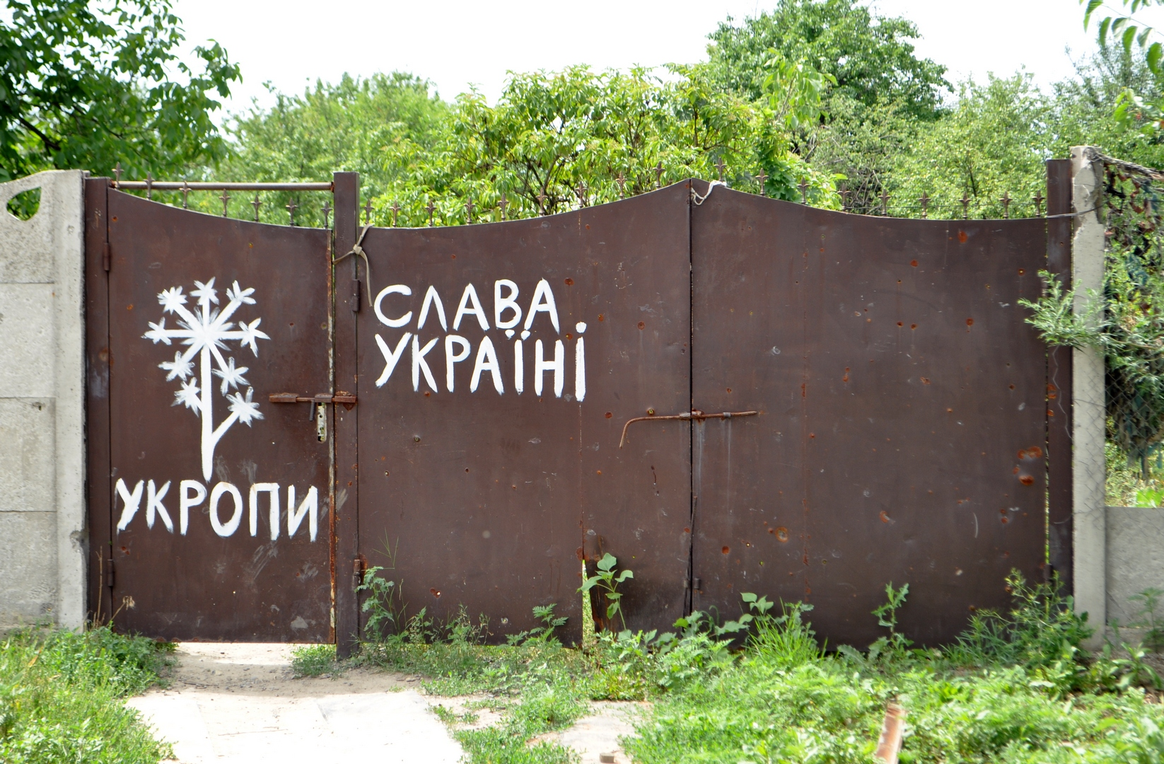 Мар’їнка 2017